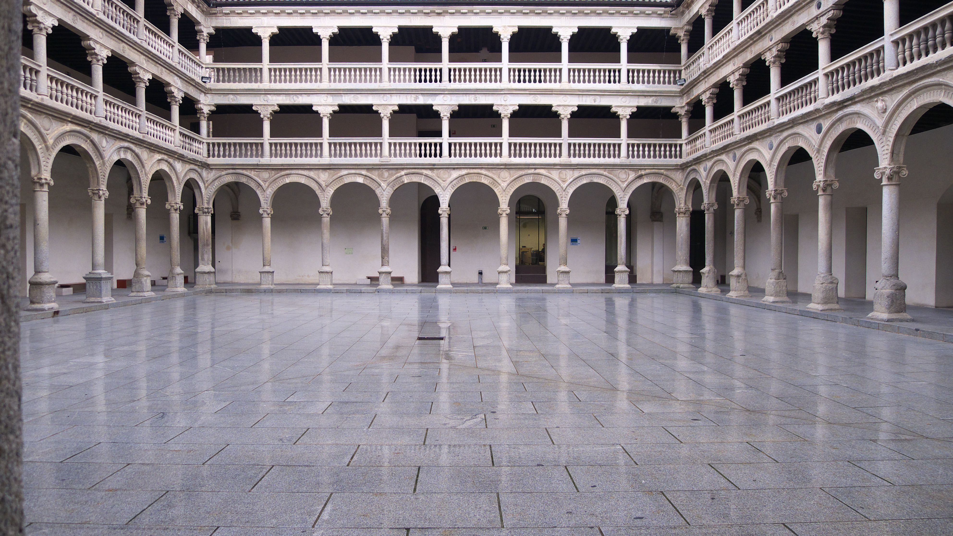 Claustro Real del Convento de San Pedro Mártir en Toledo (1541) Obra de Hernán González de Lara (1512-1575) bajo la dirección de su maestro Alonso de Covarrubias.